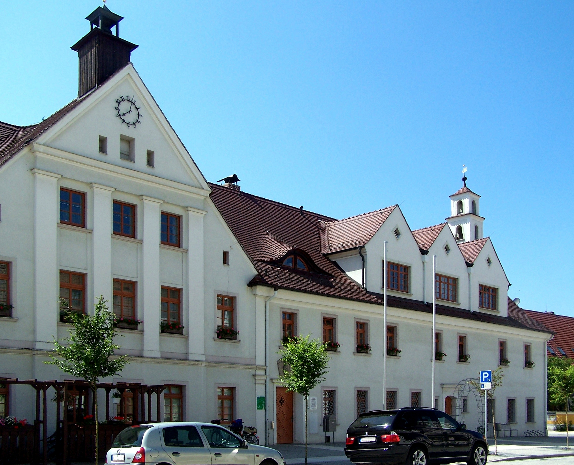 Rathaus von Rothenburg/O.L., Landkreis Görlitz